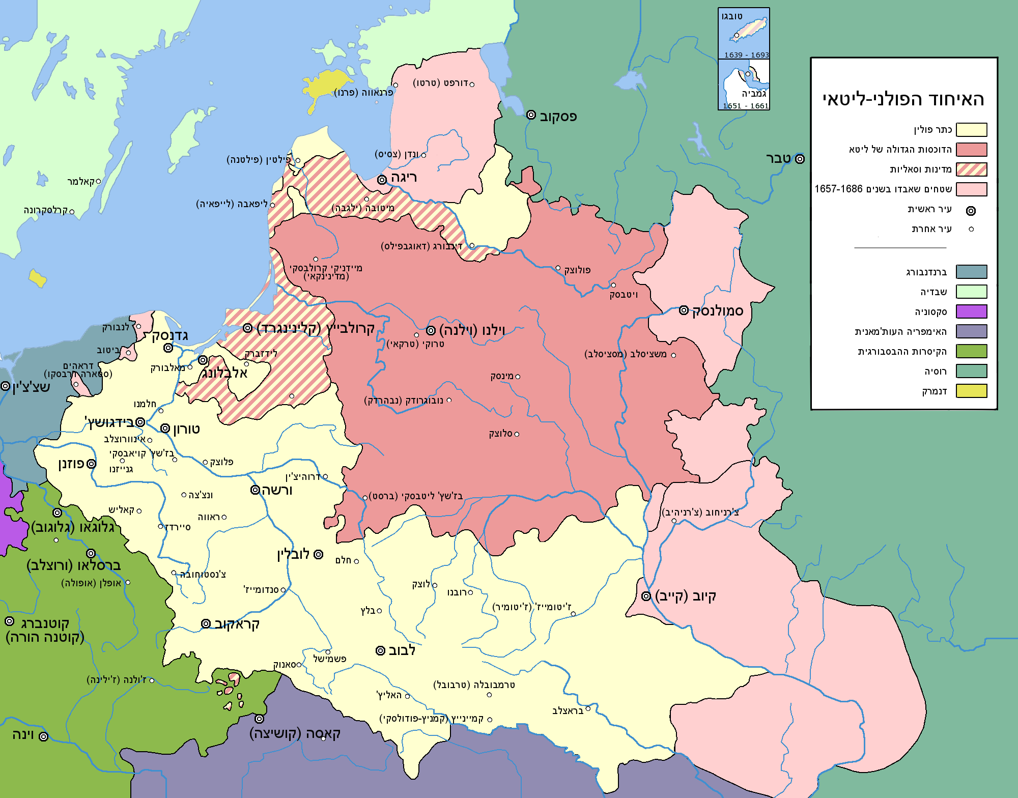 האיחוד הפולני-ליטאי